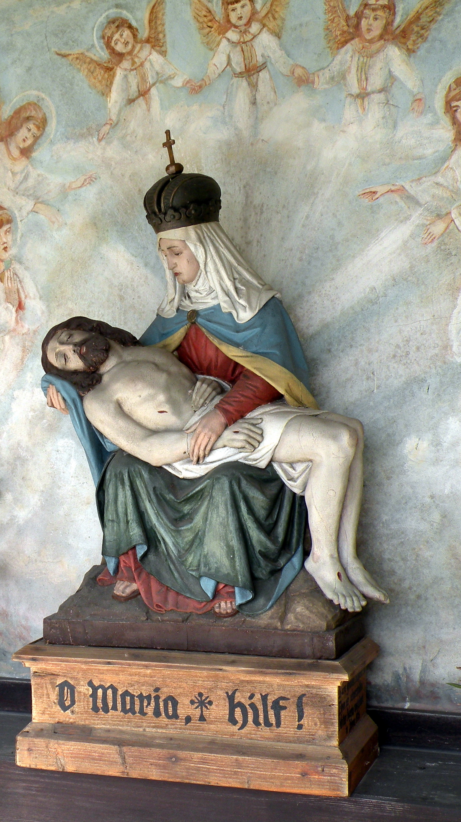 Muttergottes mit sterbendem Jesus in der Heiligensteinkapelle in Allerheiligen im Mühlkreis in Oberösterreich